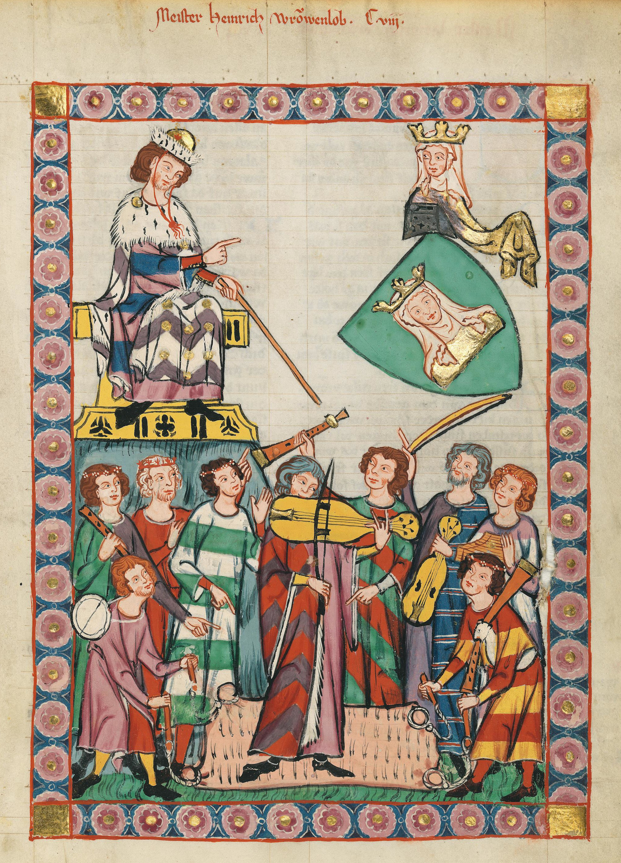 Codex Manesse, UB Heidelberg, Cod. Pal. germ. 848, fol. 399r, Meister Heinrich Frauenlob